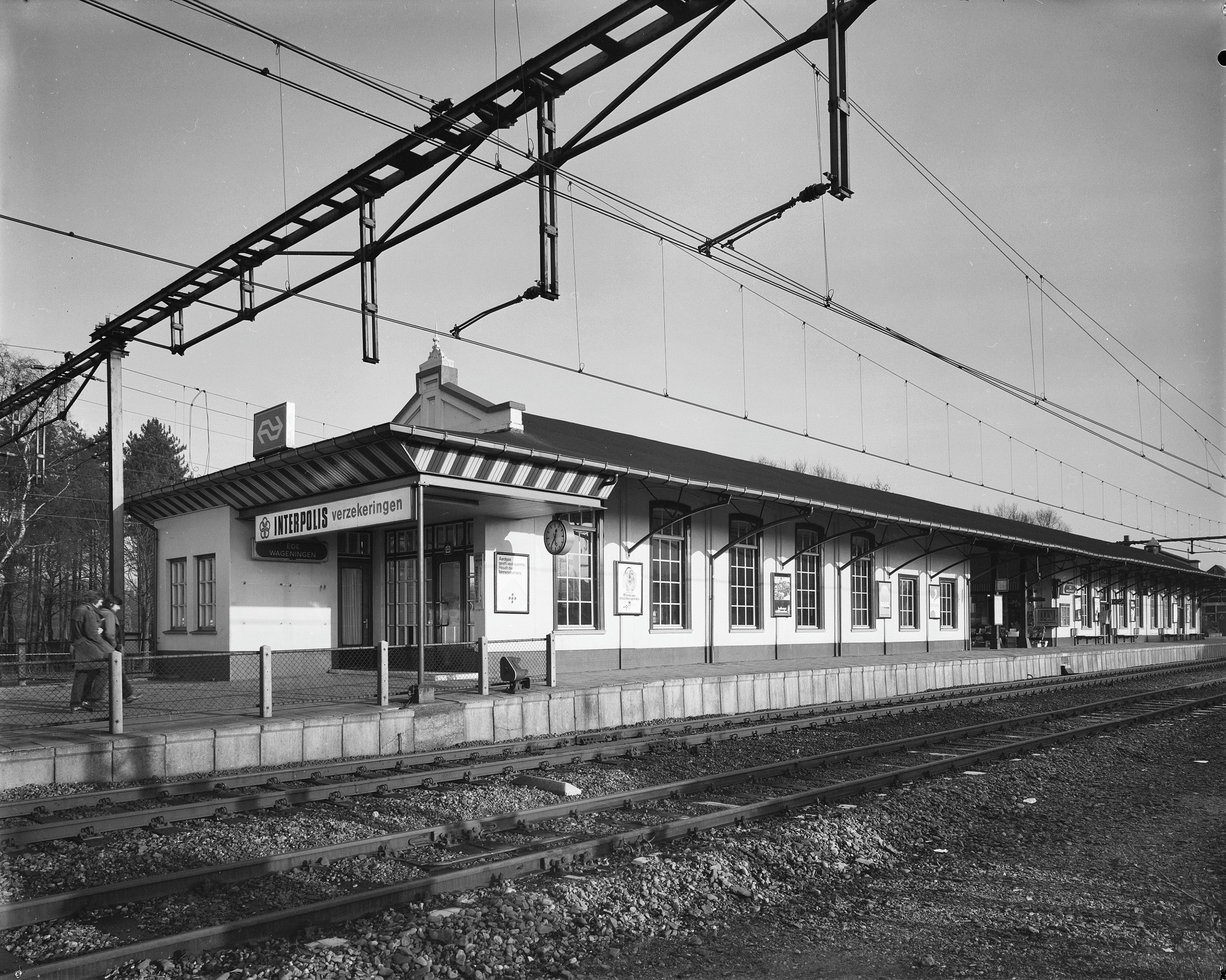 Station Ede- Wageningen: voorgevel en perronzijde